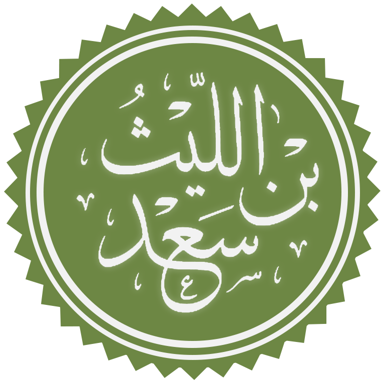 تخطيط اسم الليث بن سعد إمام أهل مصر